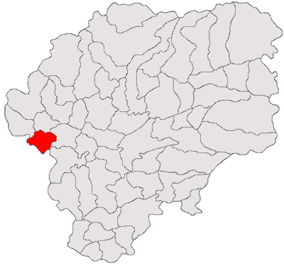 Categorie:Hărţi ale judeţului Bistriţa-Năsăud